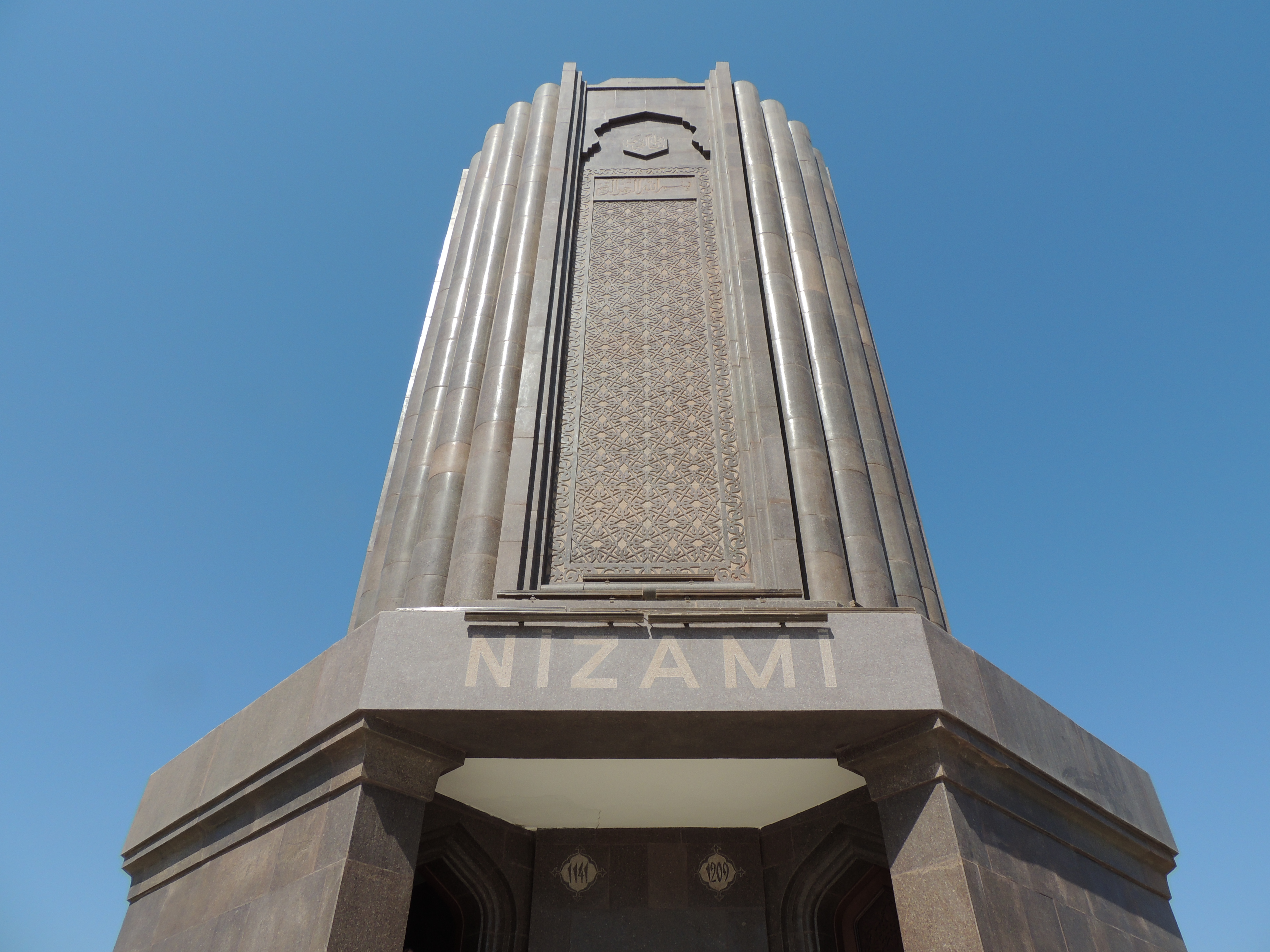 Nizami Gəncəvinin mavzoleyi, Gəncə, Azərbaycan.